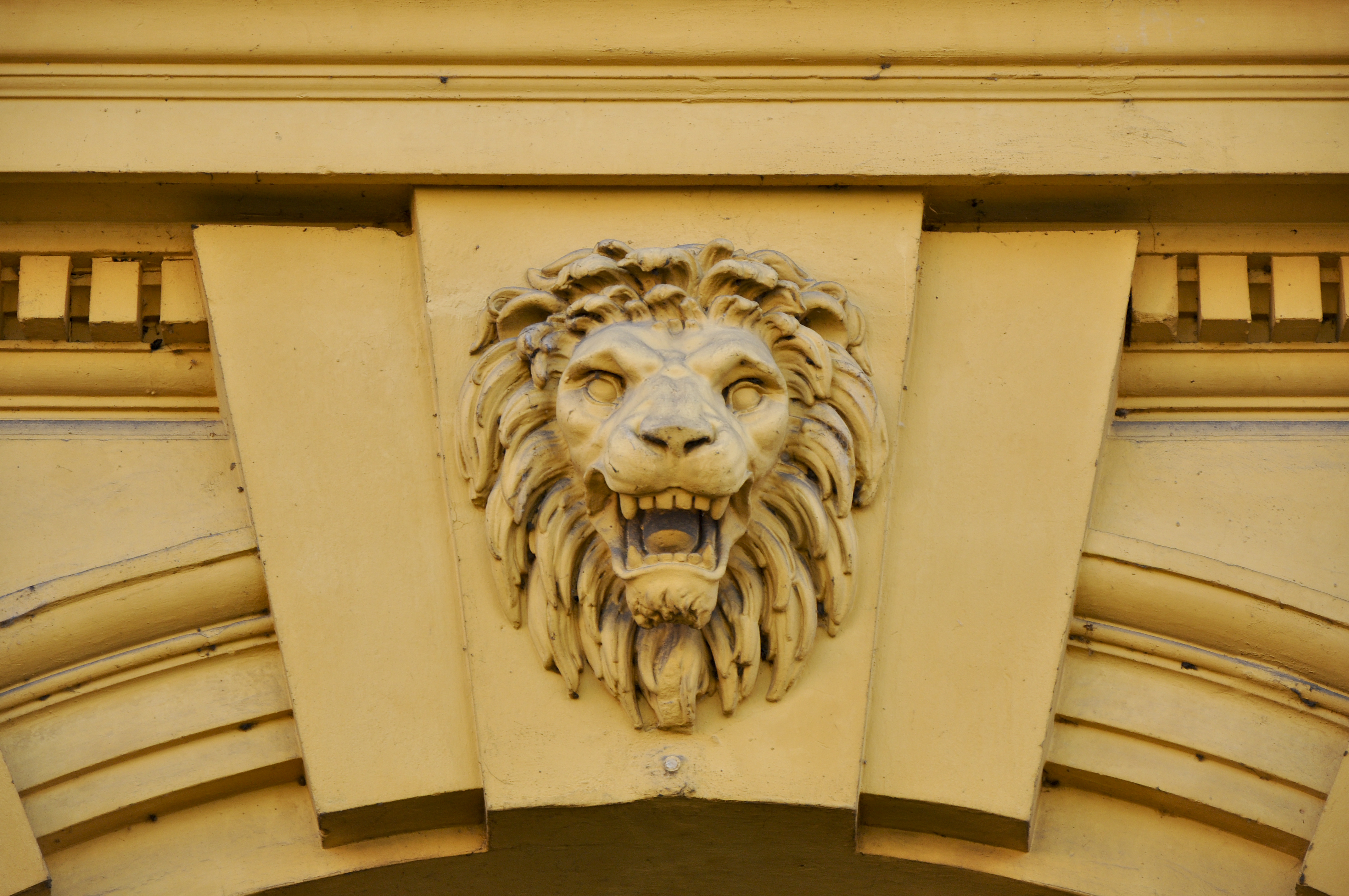 Haus Löwenfeld & Hofmann (ehem. Jaukermühle) samt zwei Nebengebäuden